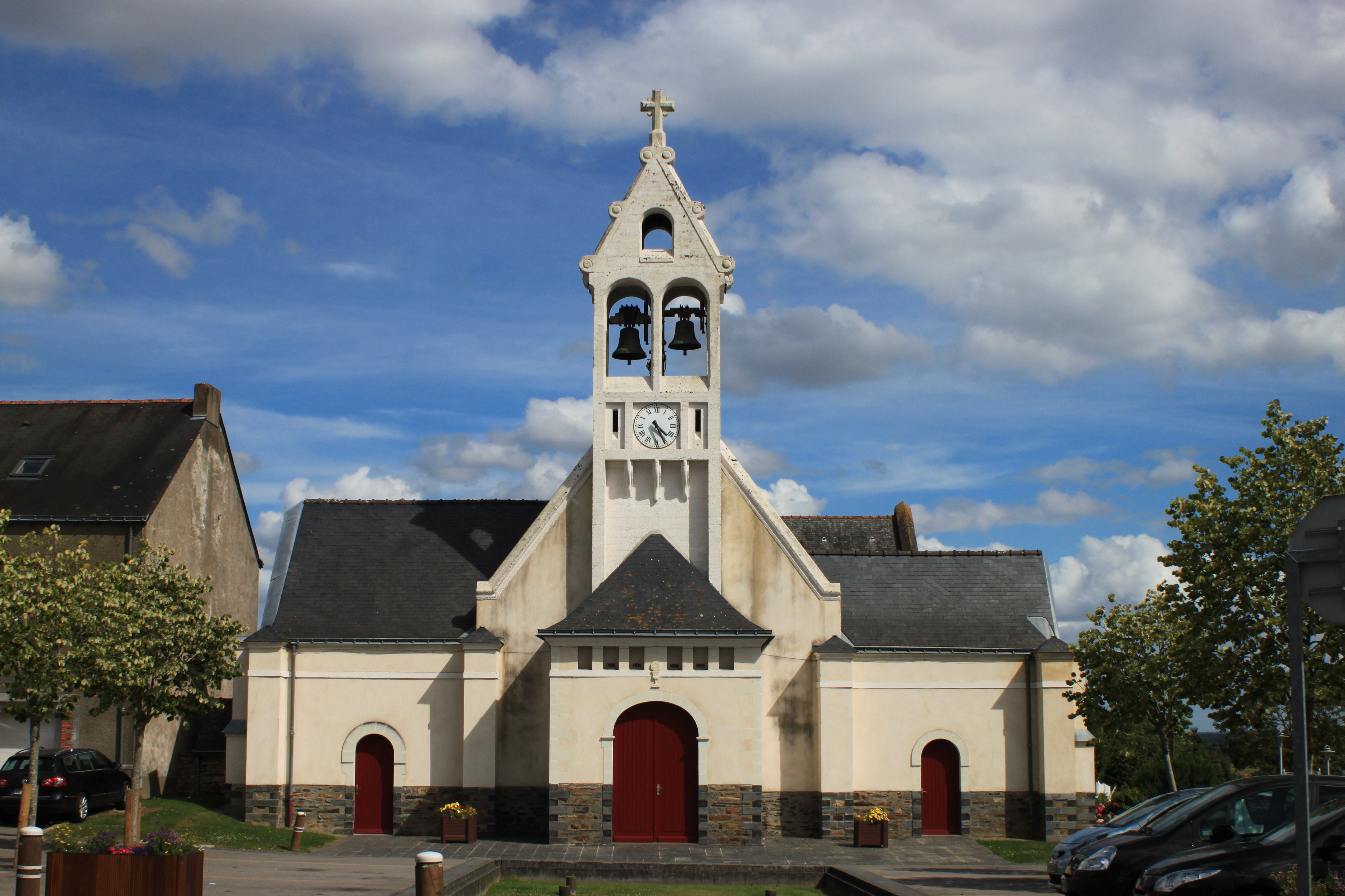 Église Saint-Étienne, XVIII°-XIX°, La Meilleraye-de-Bretagne.